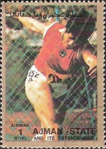 Faina Melnyk